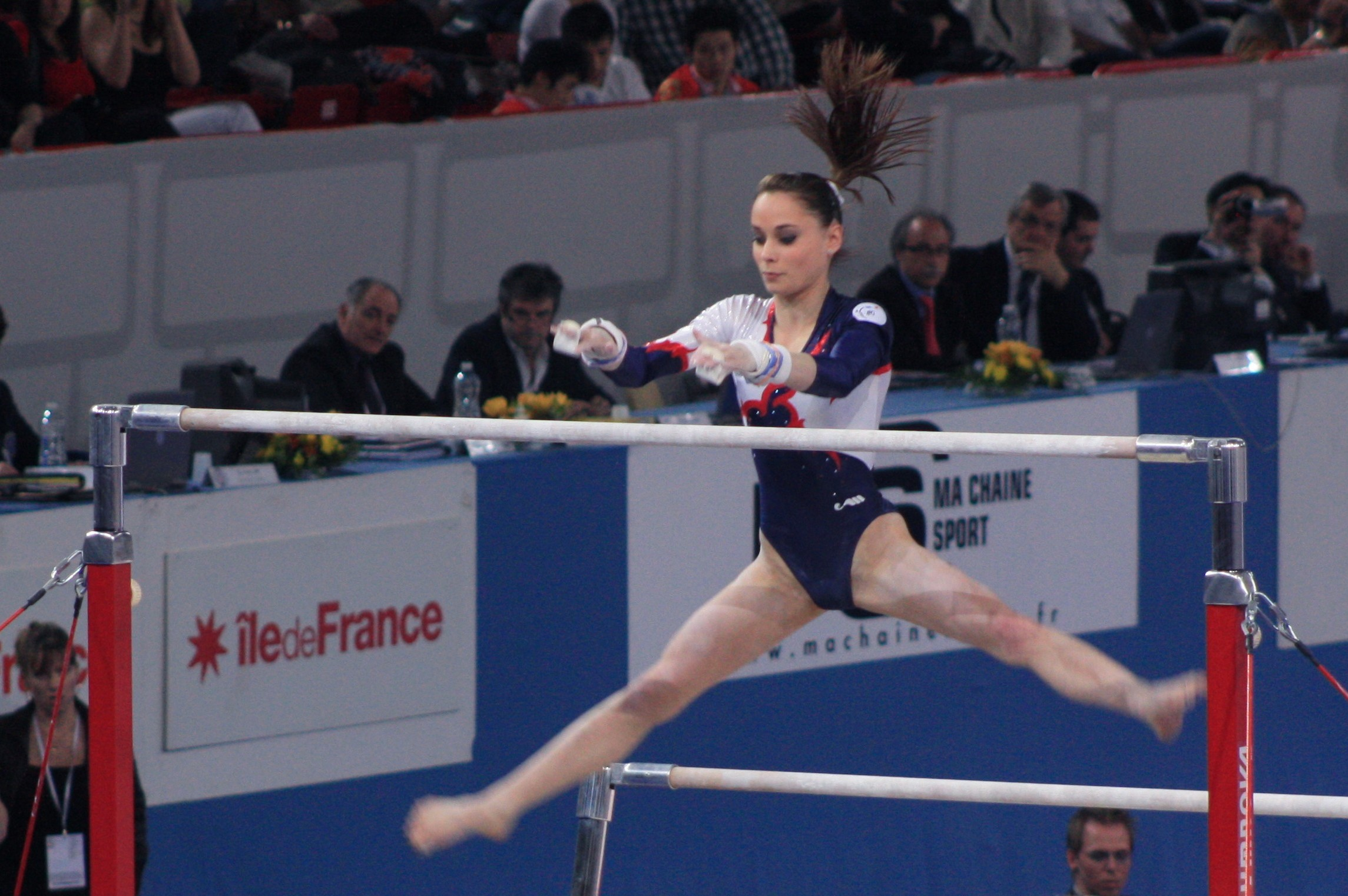 Pauline Morel en finale des barres asymétriques aux 17e Internationaux de France en 2010.